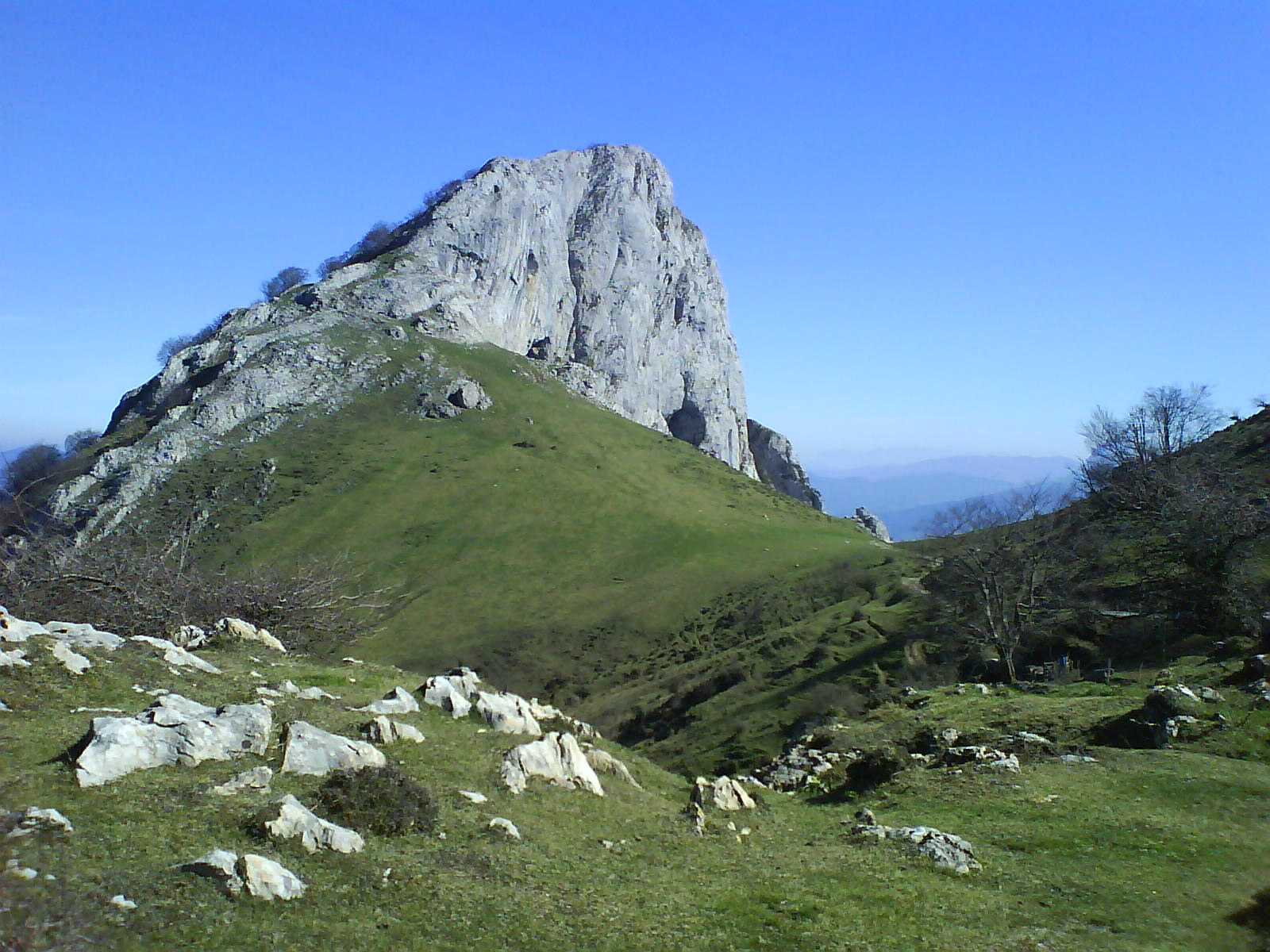 Vista del monte Mugarra desde Mugarrekolanda, Vizcaya, País Vasco, España